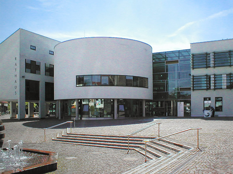 Rathaus in Bad Rappenau